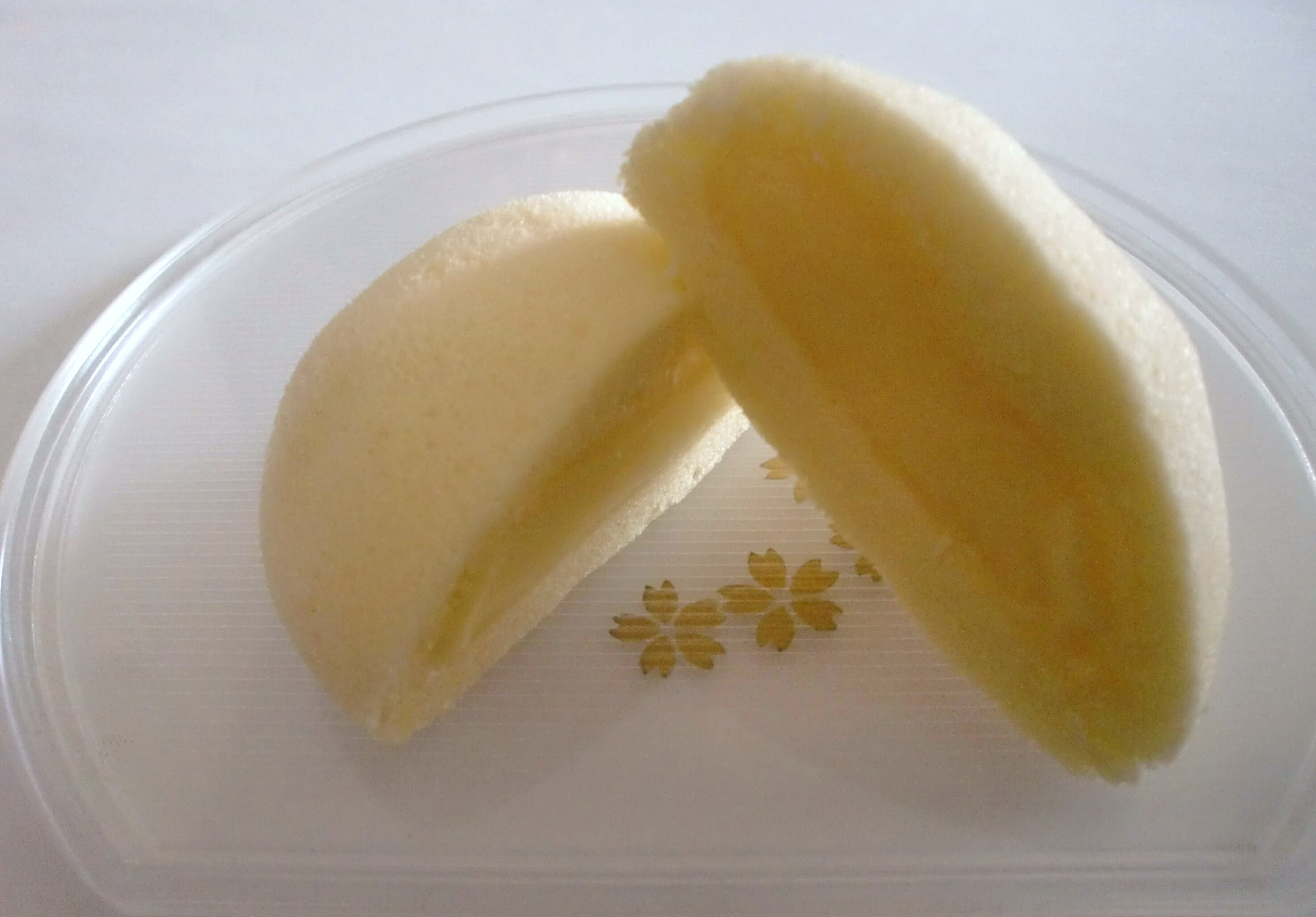 「かすたどん」の画像（鹿児島県産、薩摩蒸気屋）